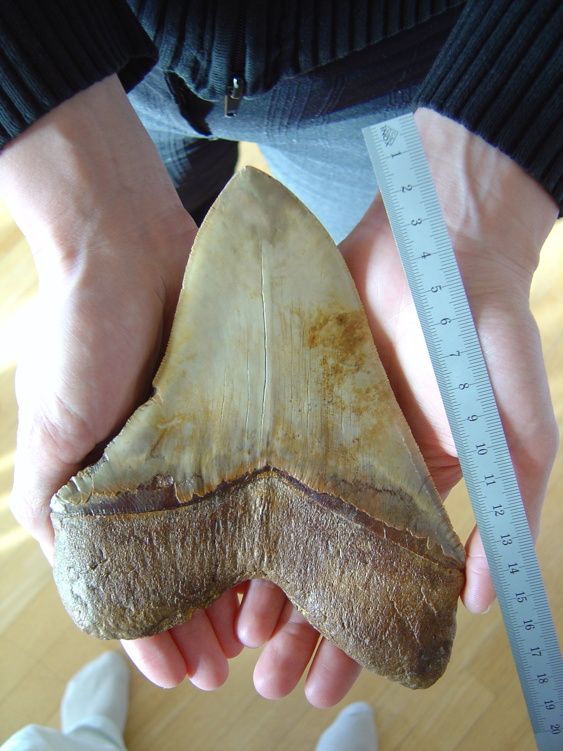 Dent fossilisée d'un requin Carcharodon megalodon, provenant du désert d'Atacama, au Chili, et datant du Miocène. Dimensions : 18 cm de diagonale et 13 cm de base.